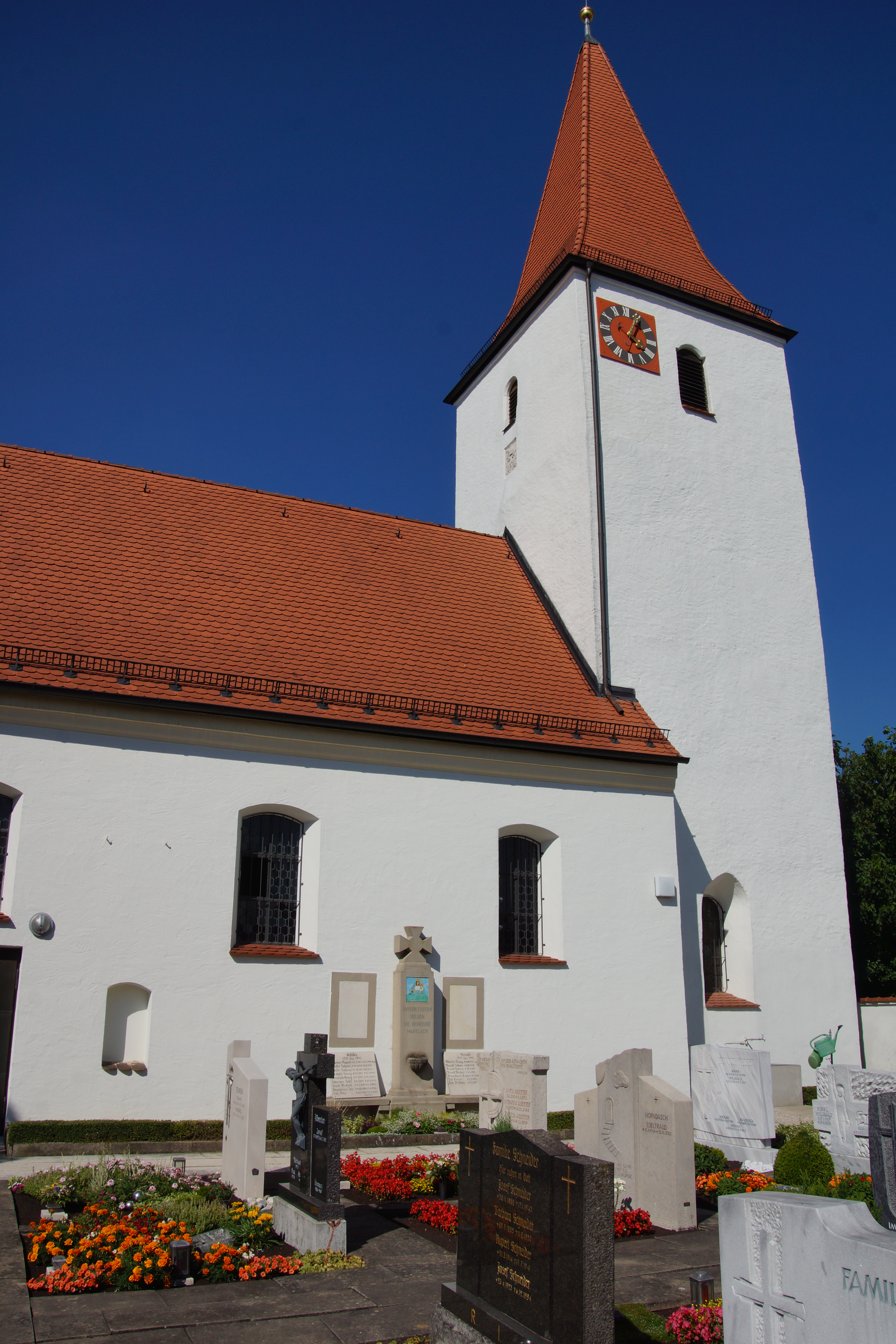 Die katholische Filialkirche St. Johann Baptist in Mantlach bei Titting